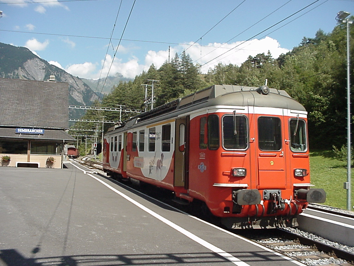 Verzweigungsbahnhof Sembrancher der Chemin de fer Martigny–Orsières